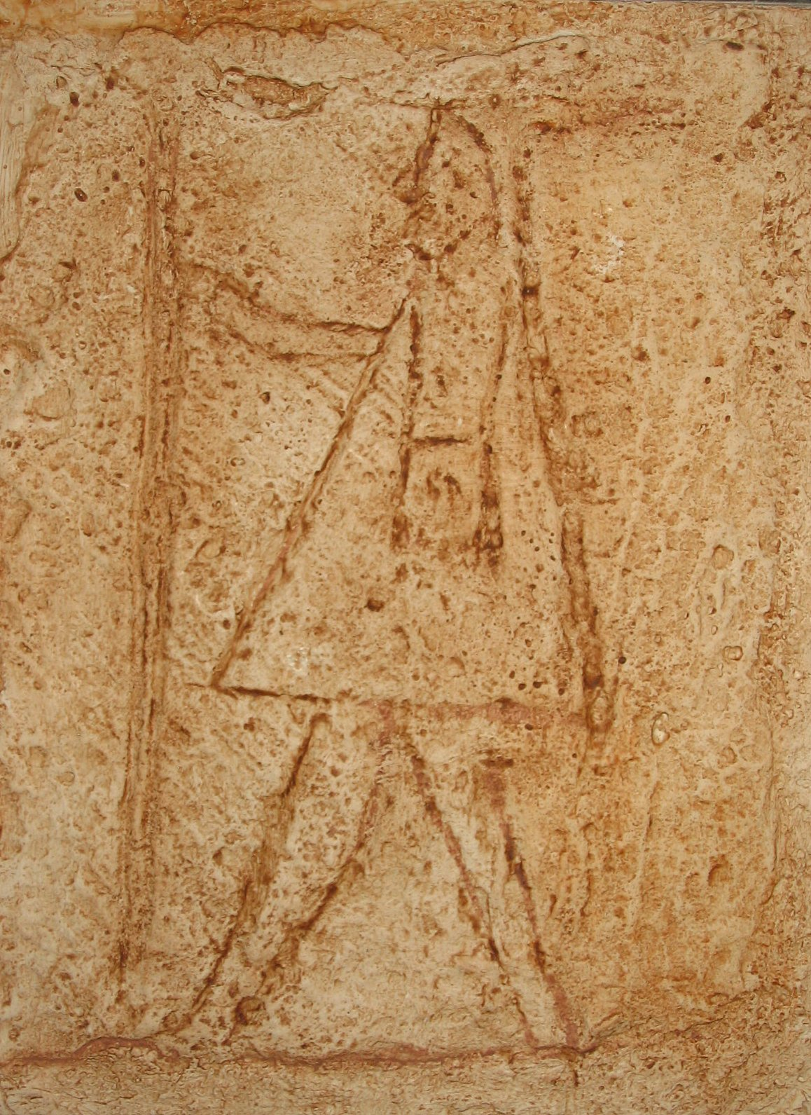 Graffiti ancien représentant un pèlerin. Musée du graffiti ancien à Marsilly (Charente-Maritime).